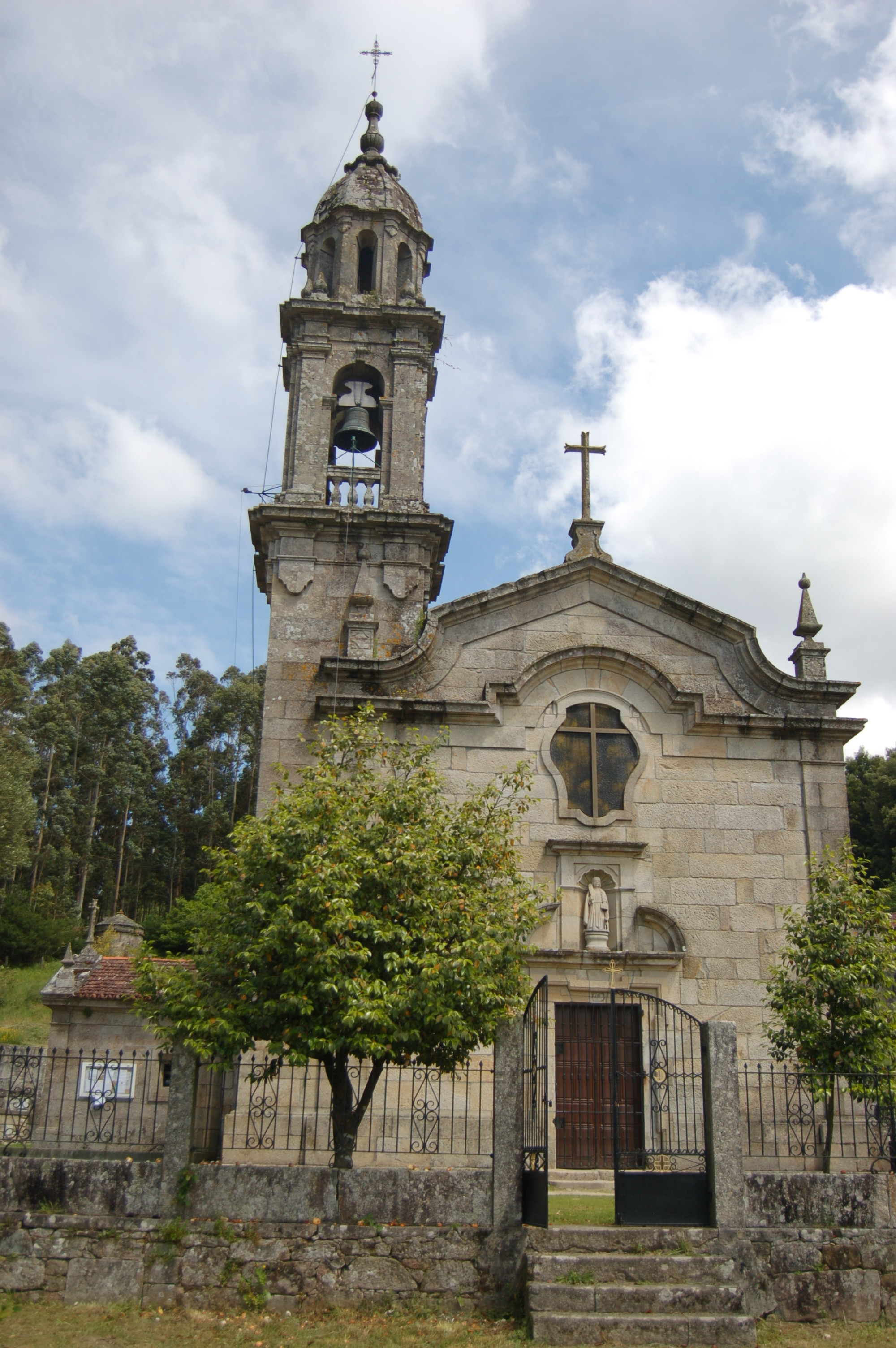 Igrexa parroquial de San Mamede de Portela (Barro)